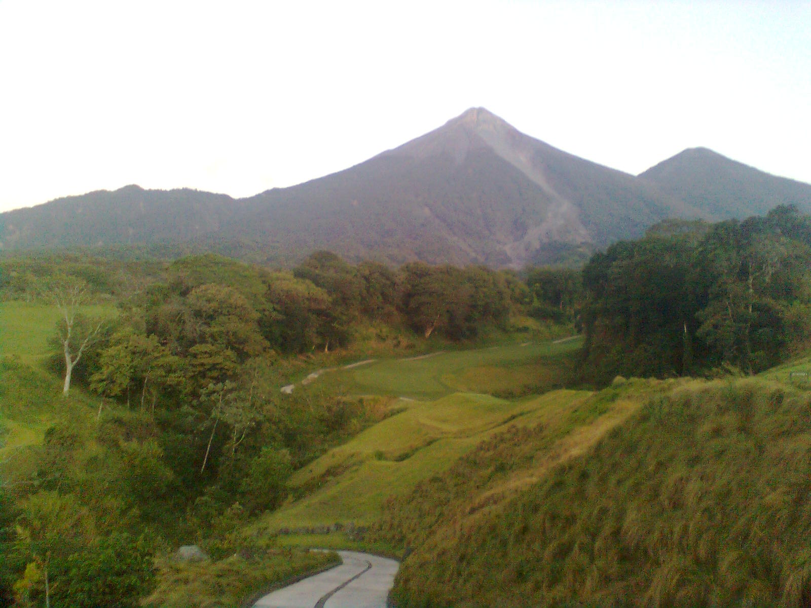 Volcán F